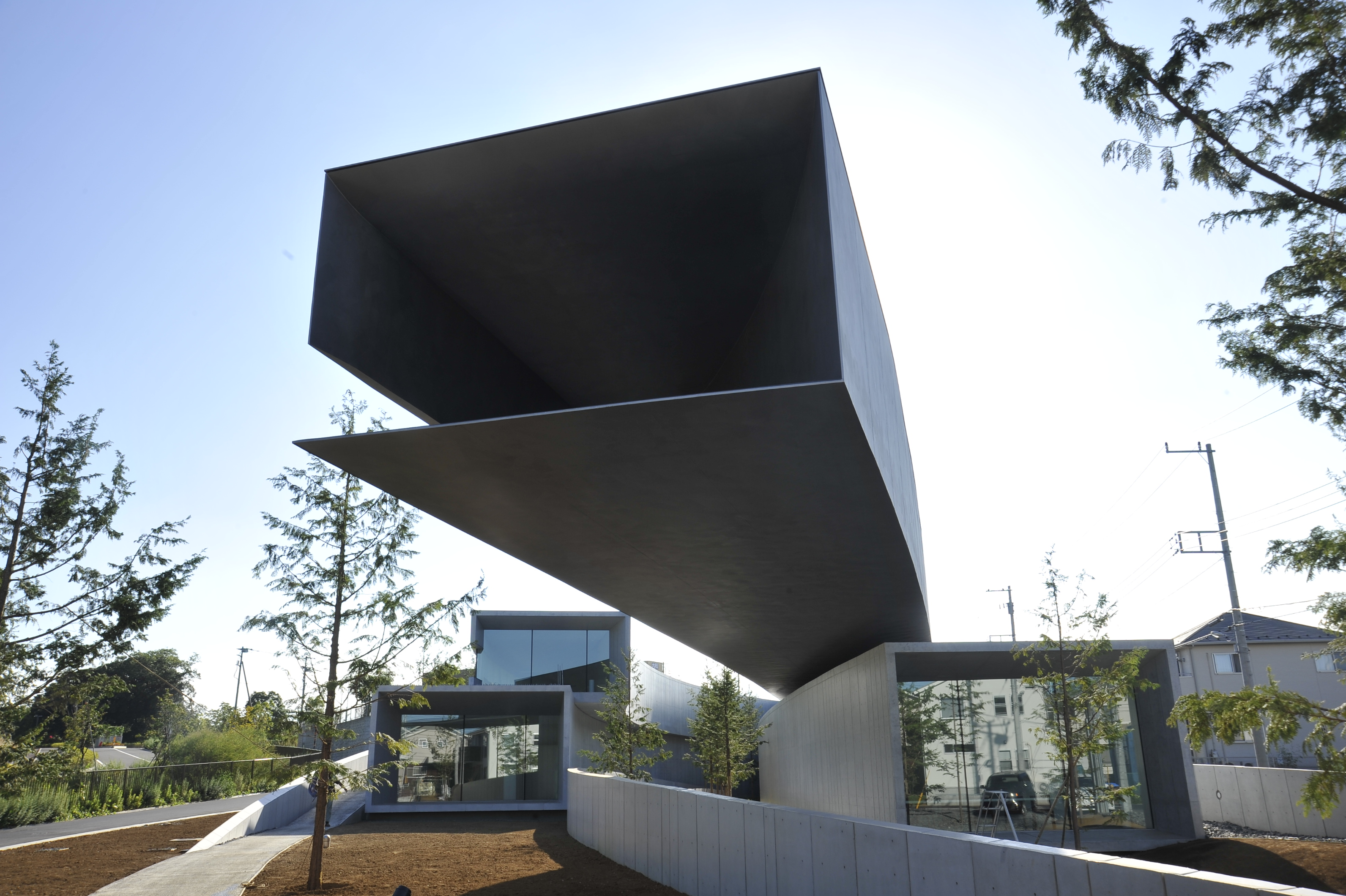 ホキ美術館の裏側。ギャラリー1の半分ほど約30メートルが完全に宙に浮いている構造。